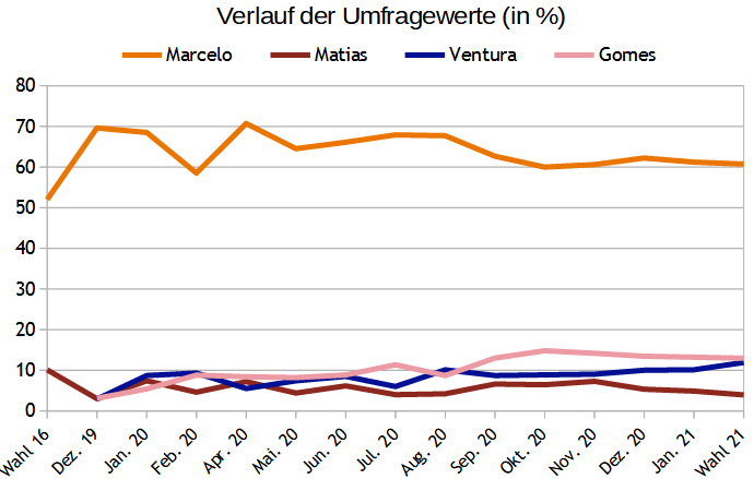 Umfragen zur Präsidentschaftswahl in Portugal 2021